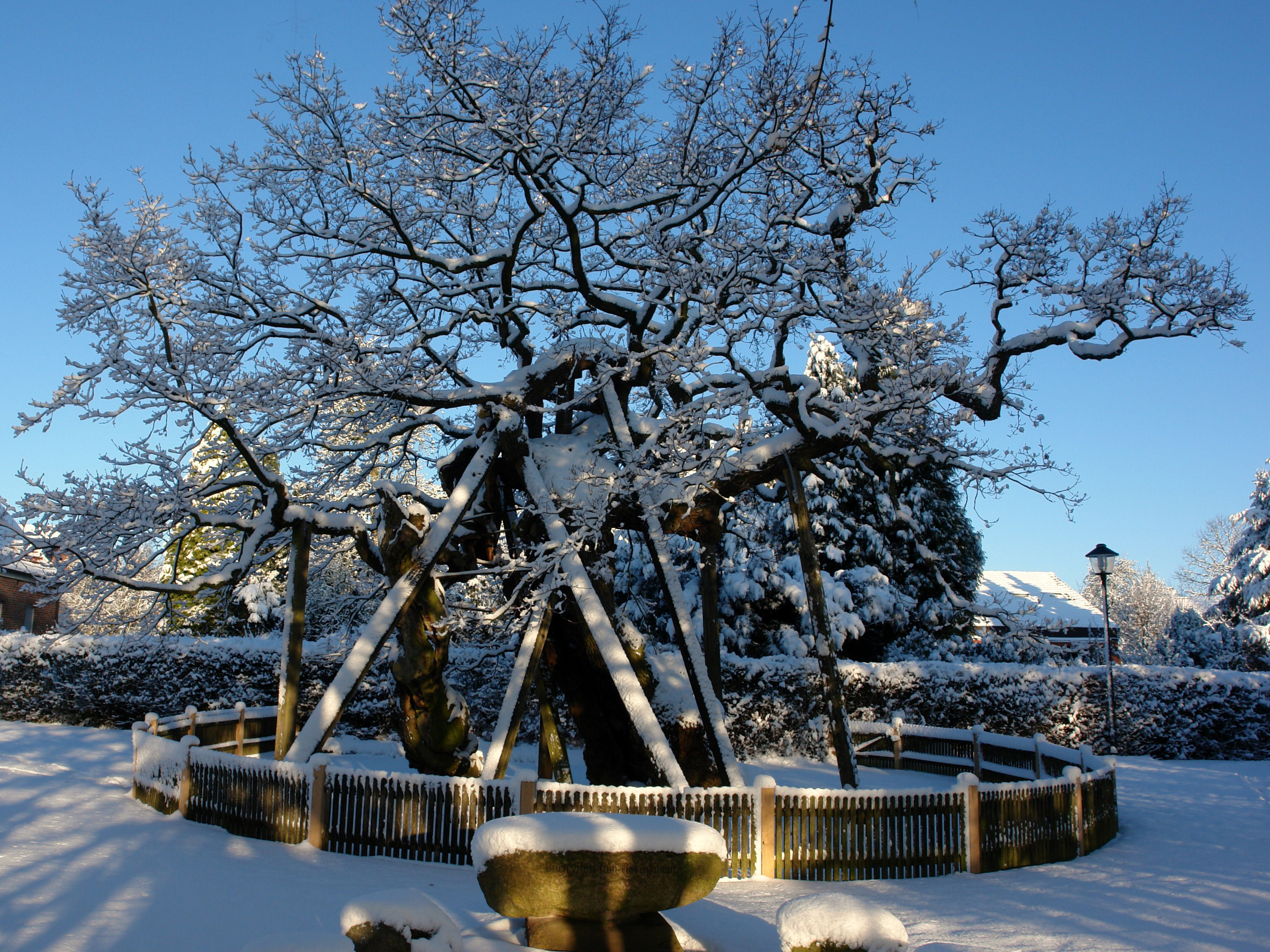 Femeiche bei Erle